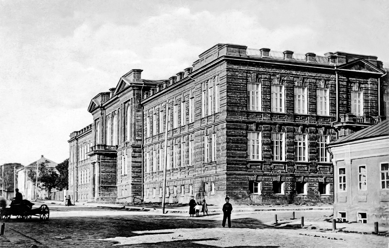 Новое здание Мариинской женской гимназии на углу Флоровской и Чистой улиц, построенное в 1903 году